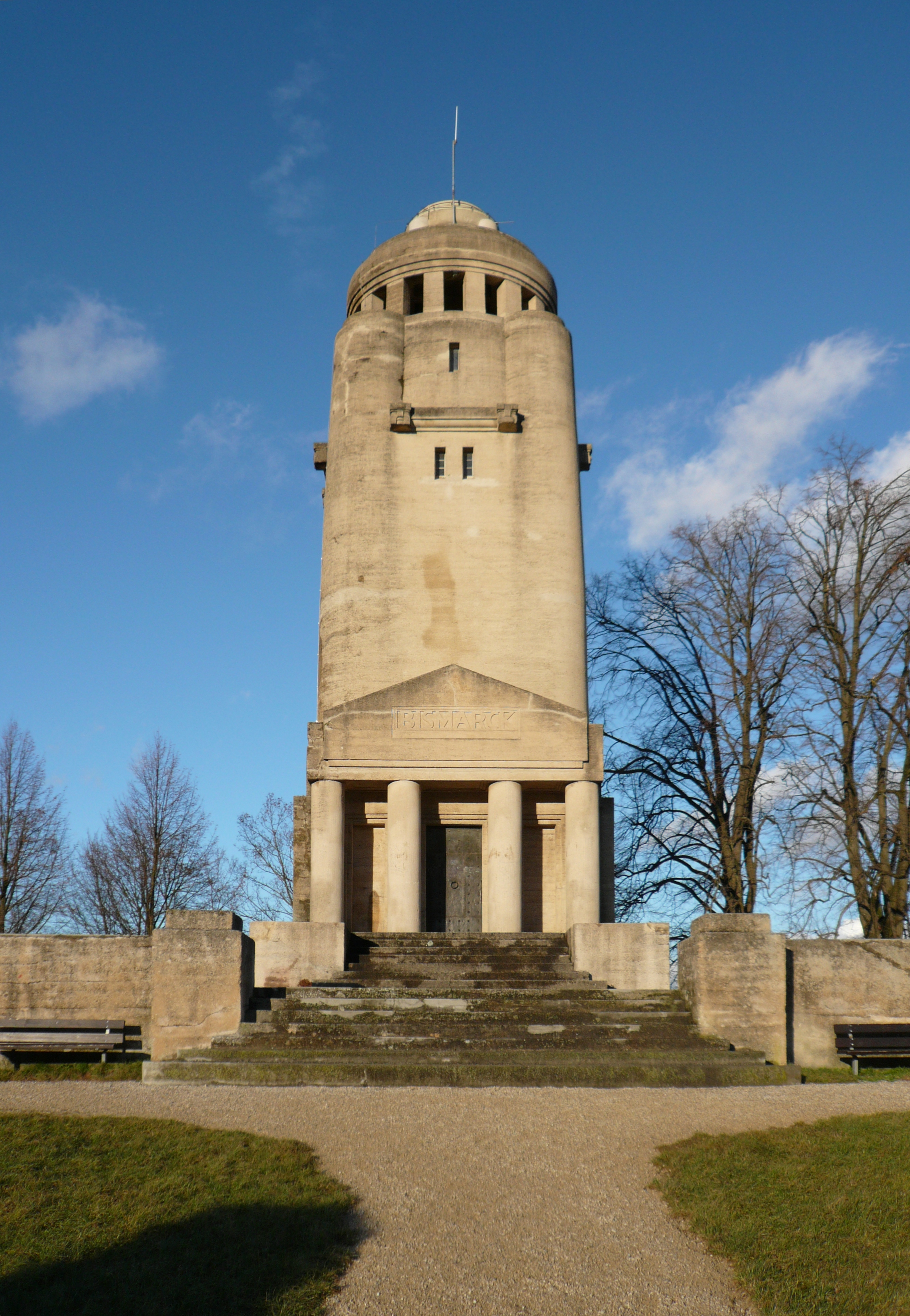 Bismarckturm in Konstanz